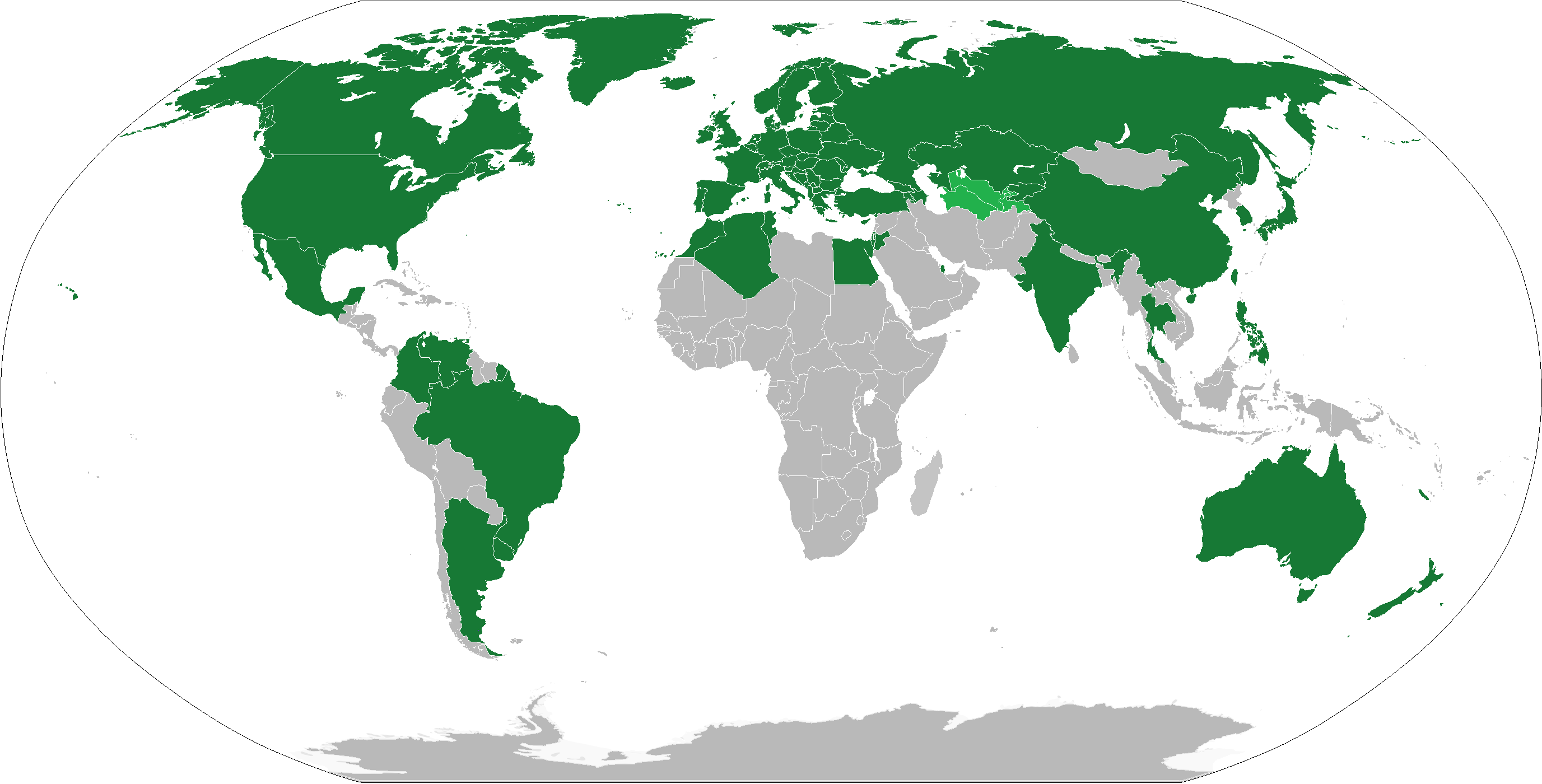 Trasmissione del Concorso Eurovisione della Canzone nel Mondo, considerando tutte le edizioni